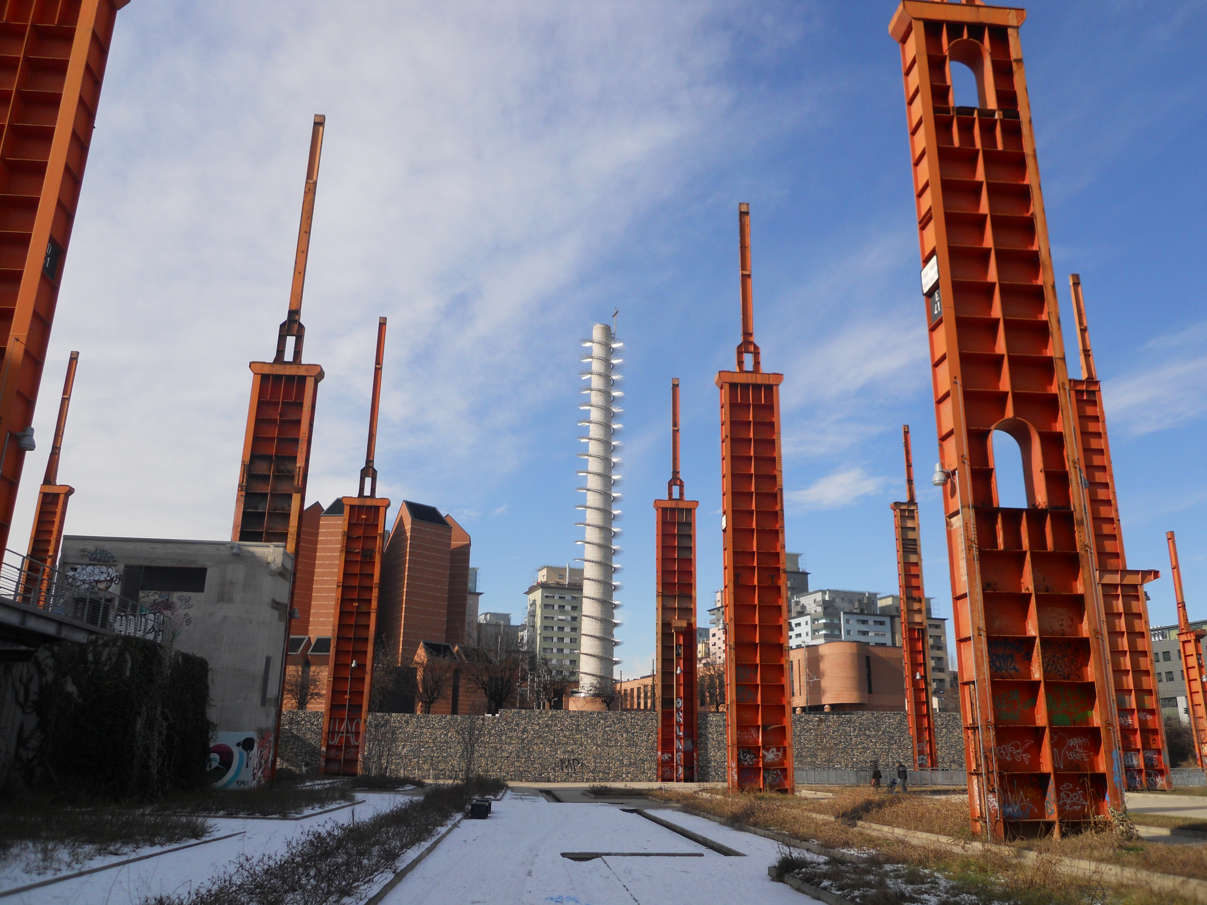 Piloni nell'Area Vitali, con la Chiesa S. Volto sullo sfondo